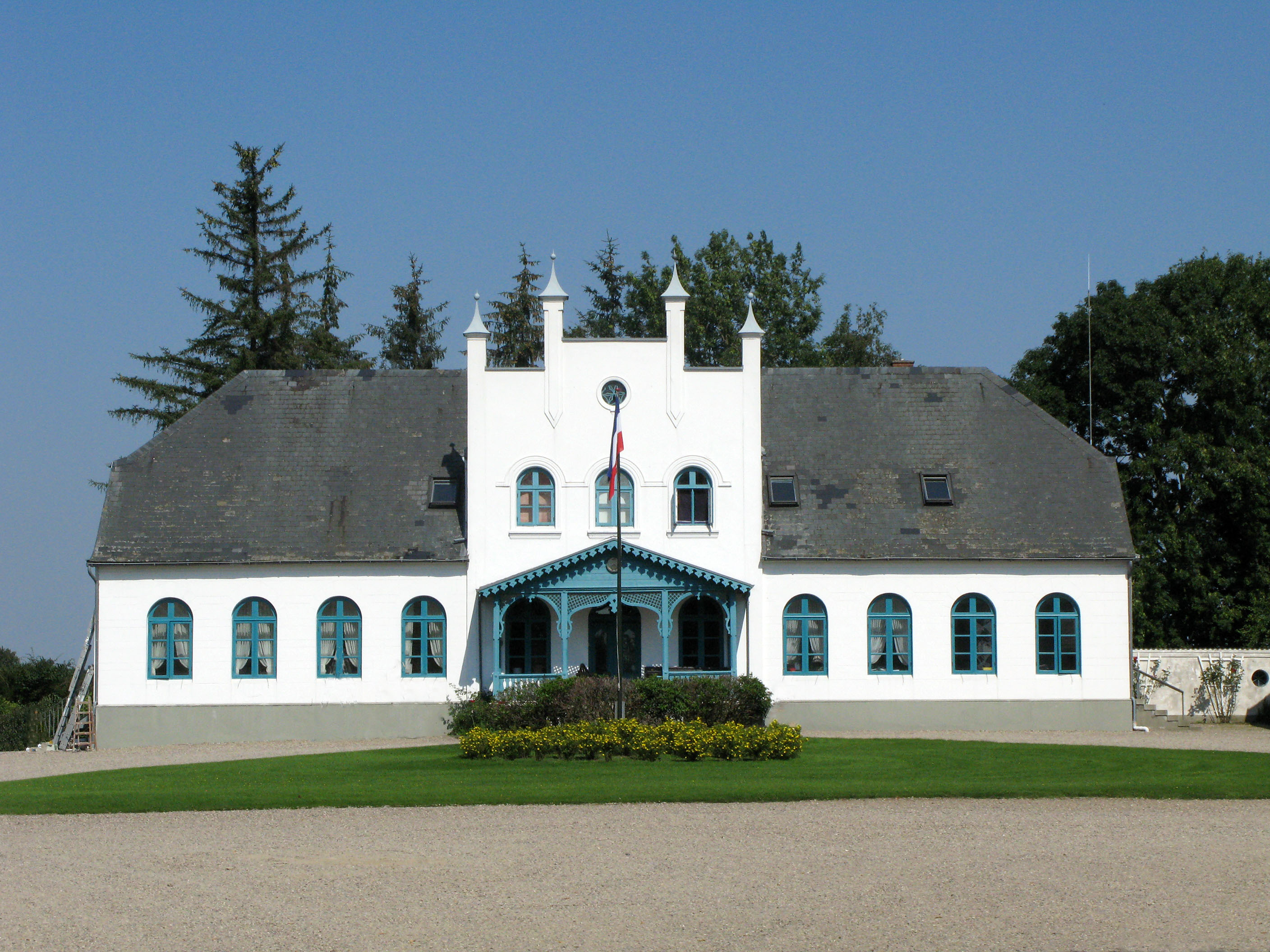 Philipsthal, Wohnhaus